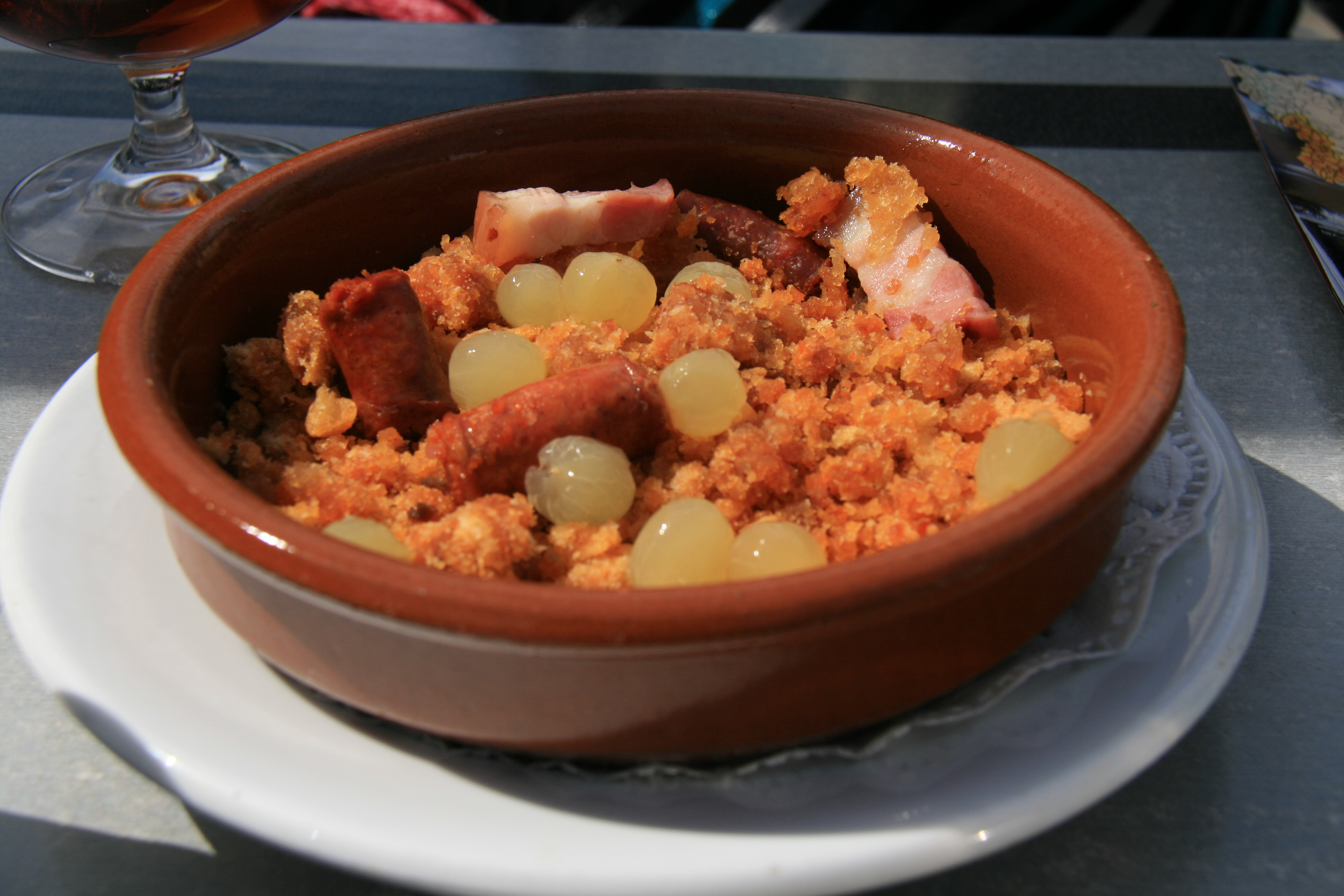 Migas con uvas y chistorra